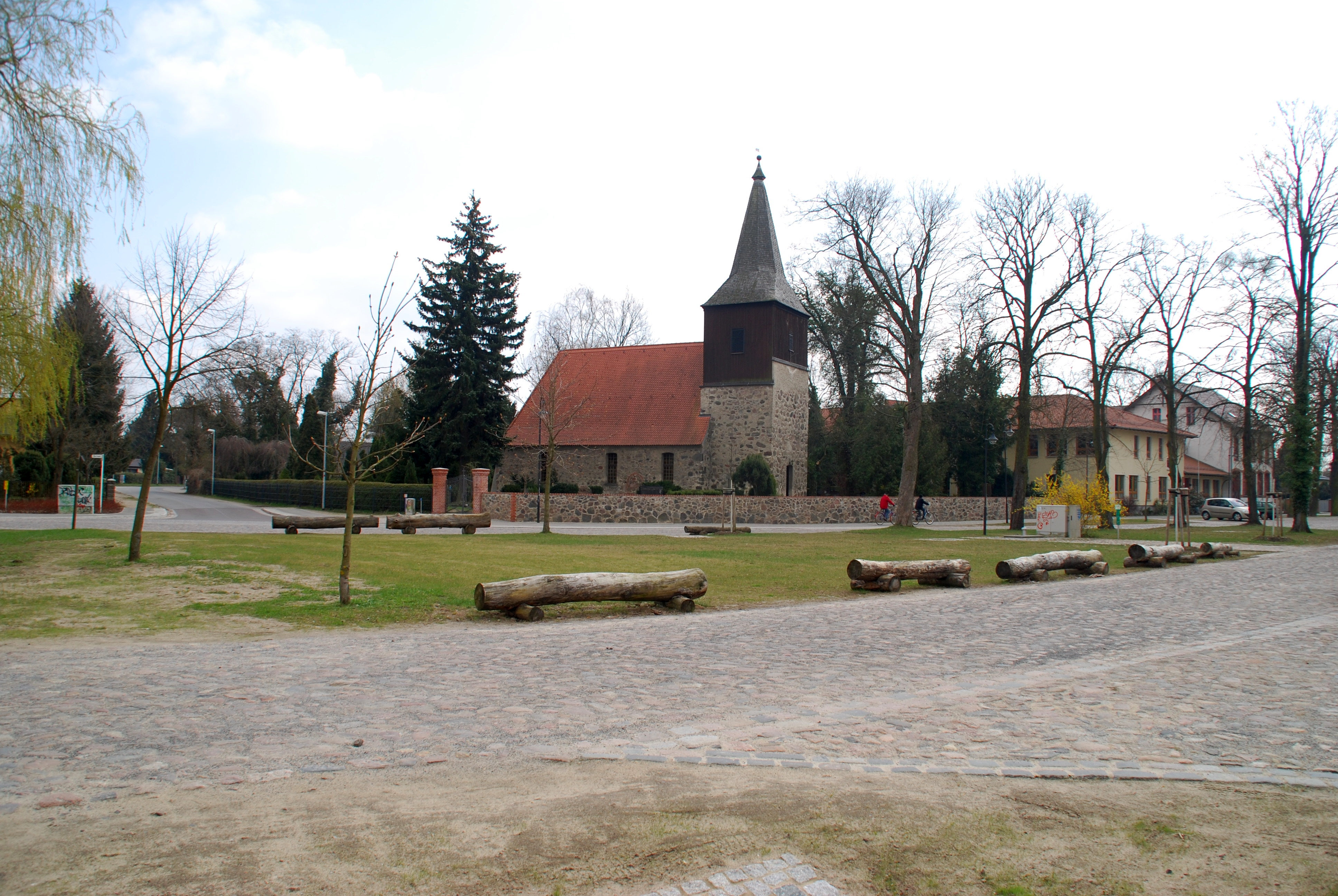 Blick über den Dorrfanger von Kleinschönebeck zur alten Dorfkirche